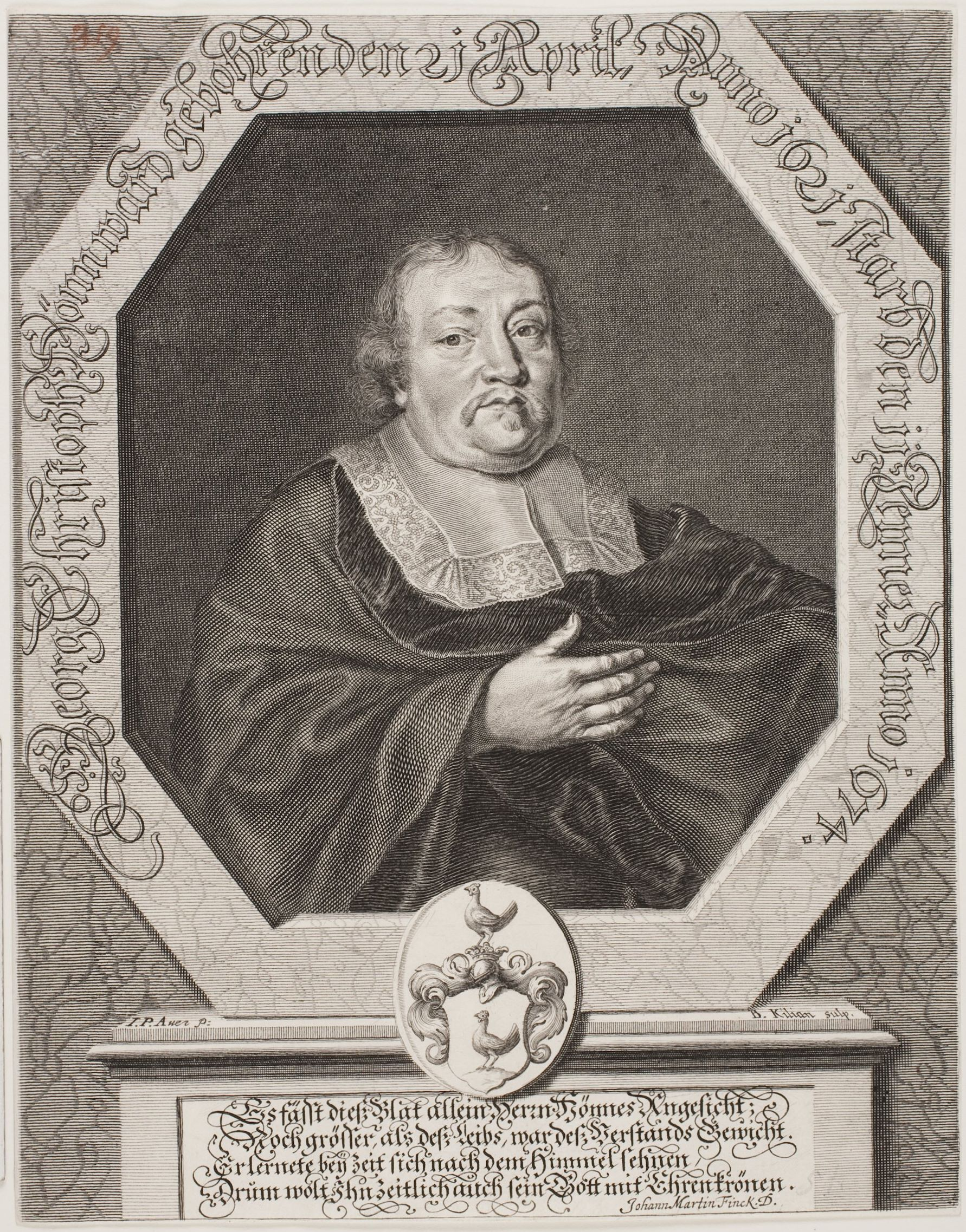 Georg Christoph Hönn, Nürnberger Kaufmann GND: 130851418